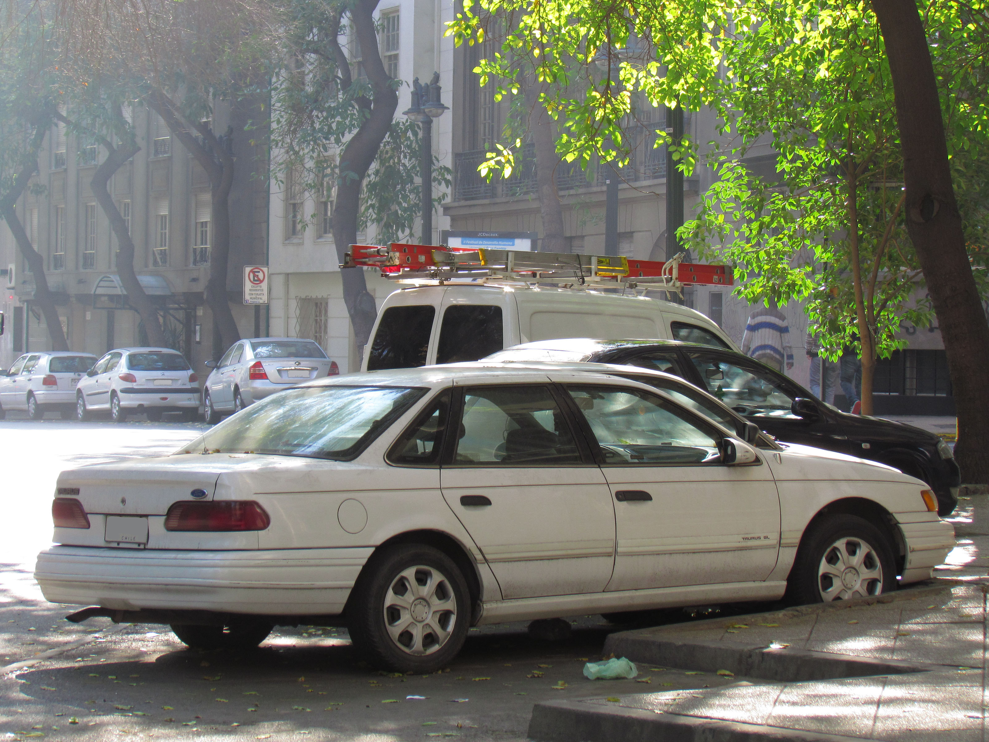 Ford Taurus 3.0 GL 1993